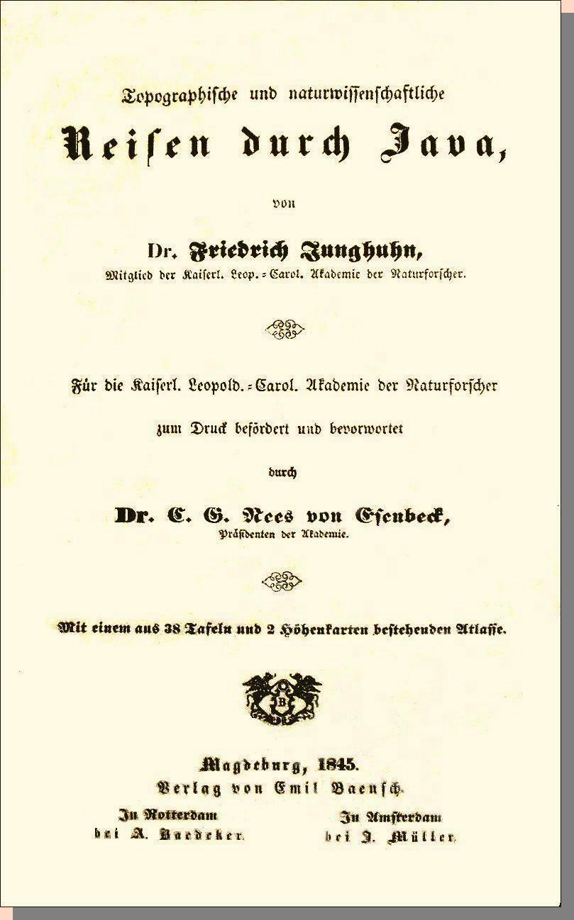 F. Junghuhn: Topographische und naturwissenschaftliche Reisen durch Java. Titelblatt.